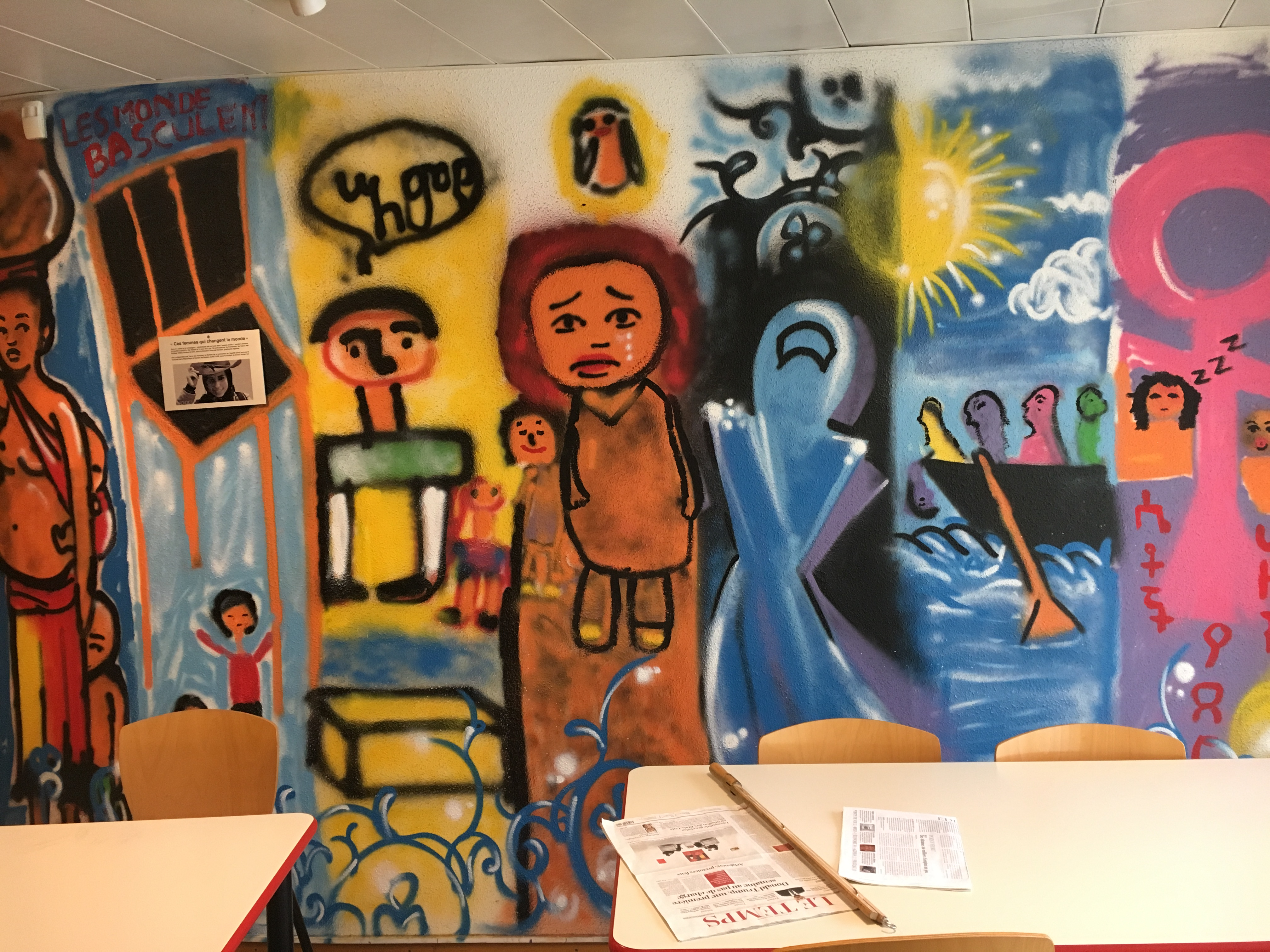 Fresque peinte par Shamsia Hassani à l'UOG de Genève